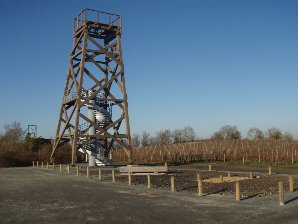 Chevalement, table d'orientation et aménagements du nouveau site restauré des Malécots (Chaudefonds-sur-Layon, France), à l'emplacement de la mine du XXe siècle. Photo prise en 2008.